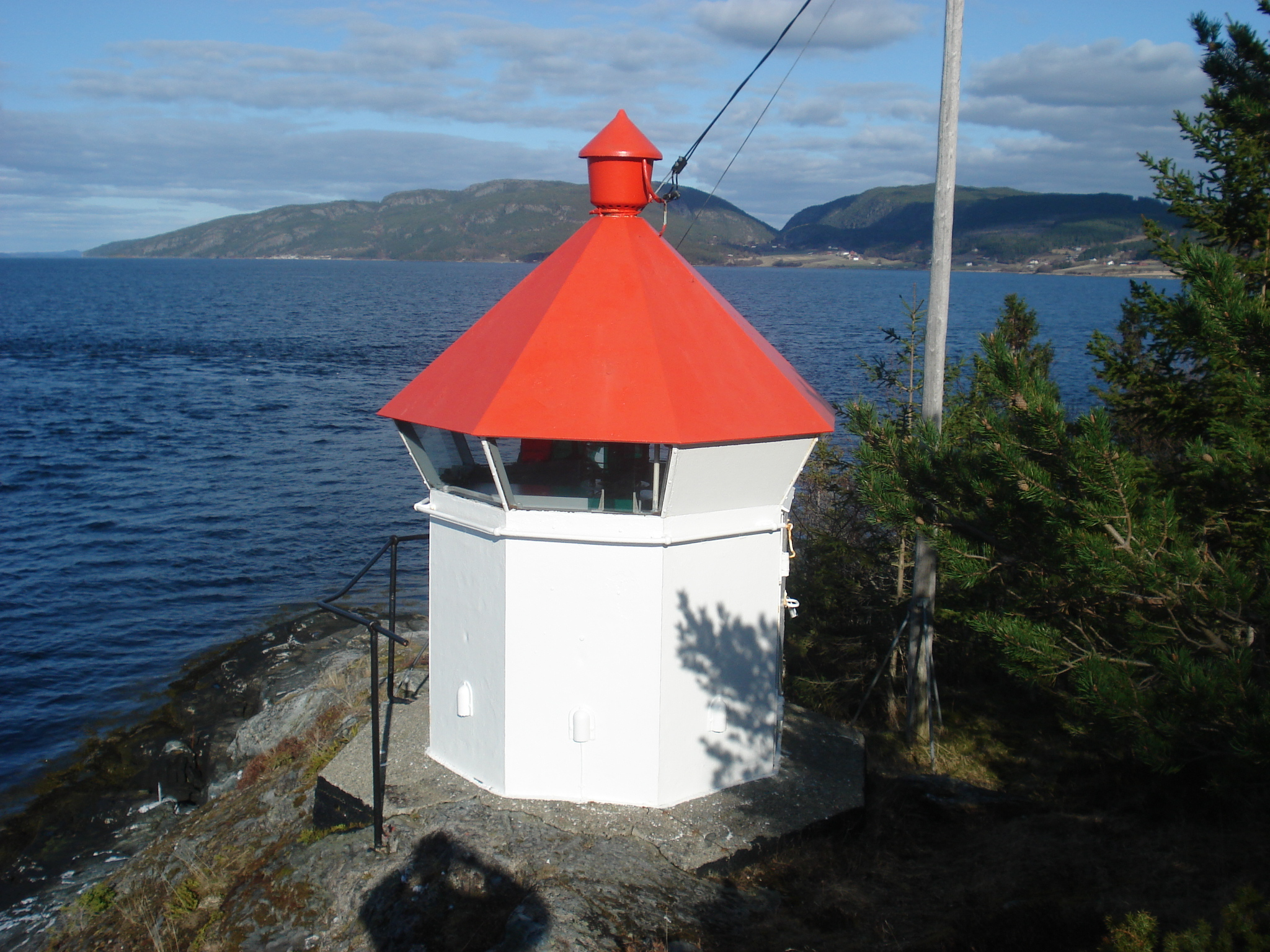 Fånes fyrlykt